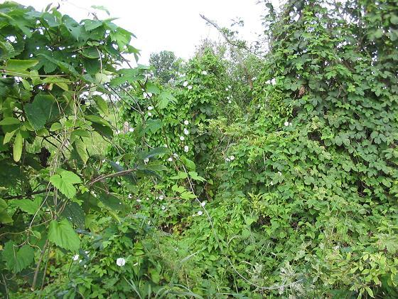 Hecke am Pfefferfließ, Bild 1, Stangenhagen, Brandenburg - Naturpark Nuthe-Nieplitz